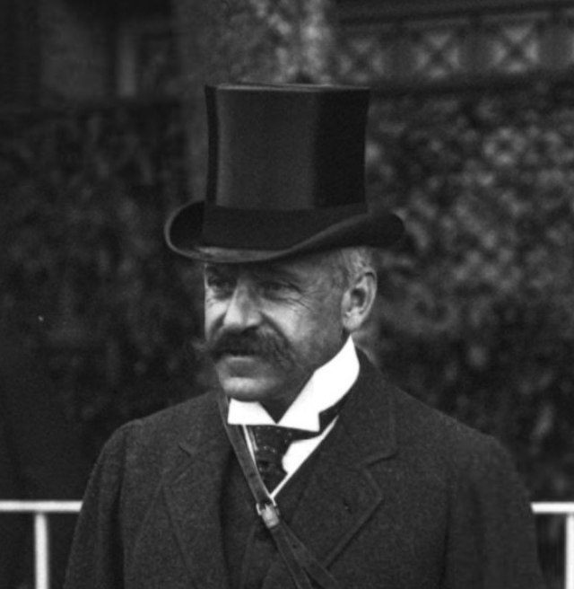 Фотография Мориса Эфрусси конец XIX века